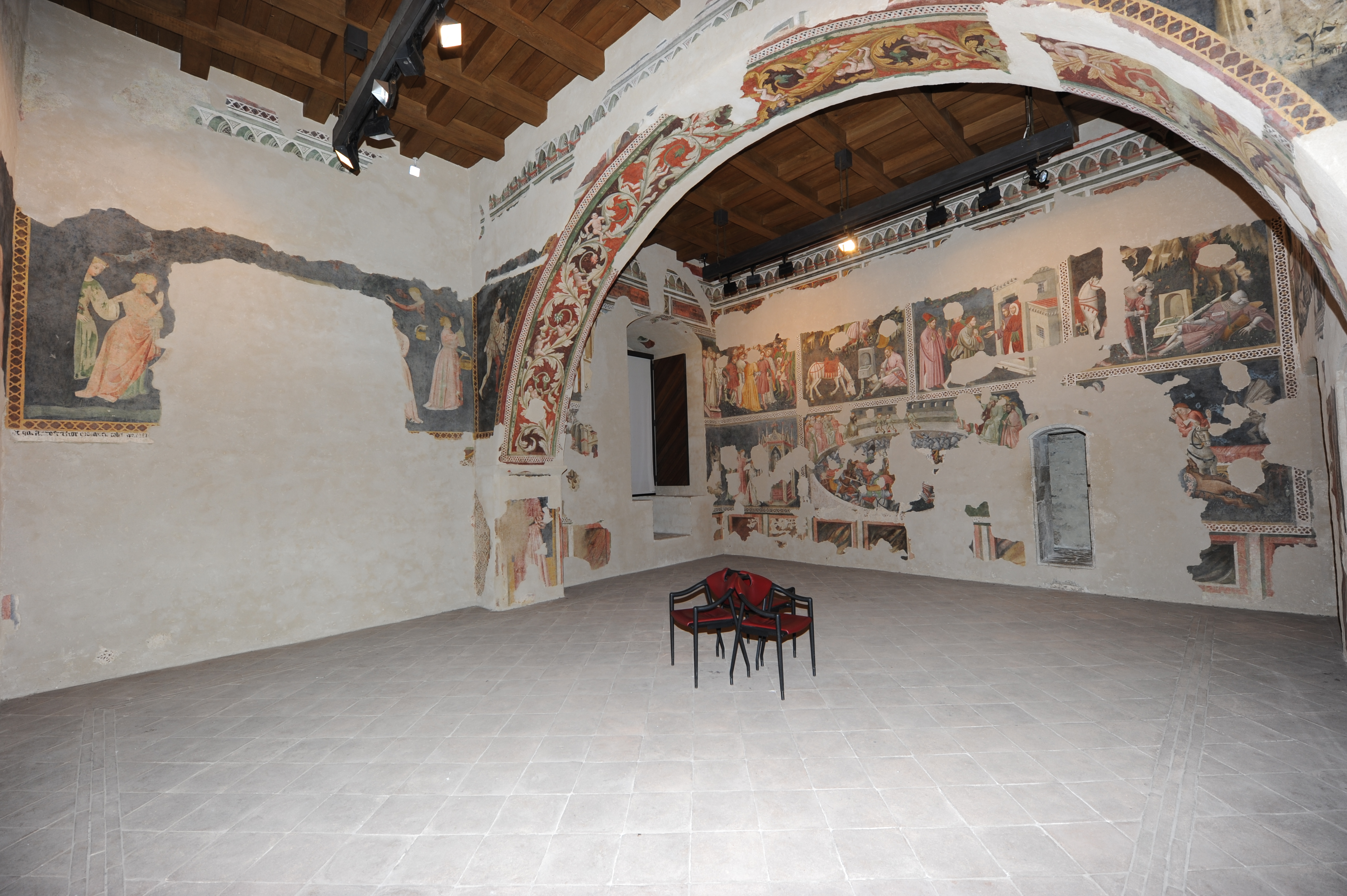 Rocca Albornoziana, Spoleto